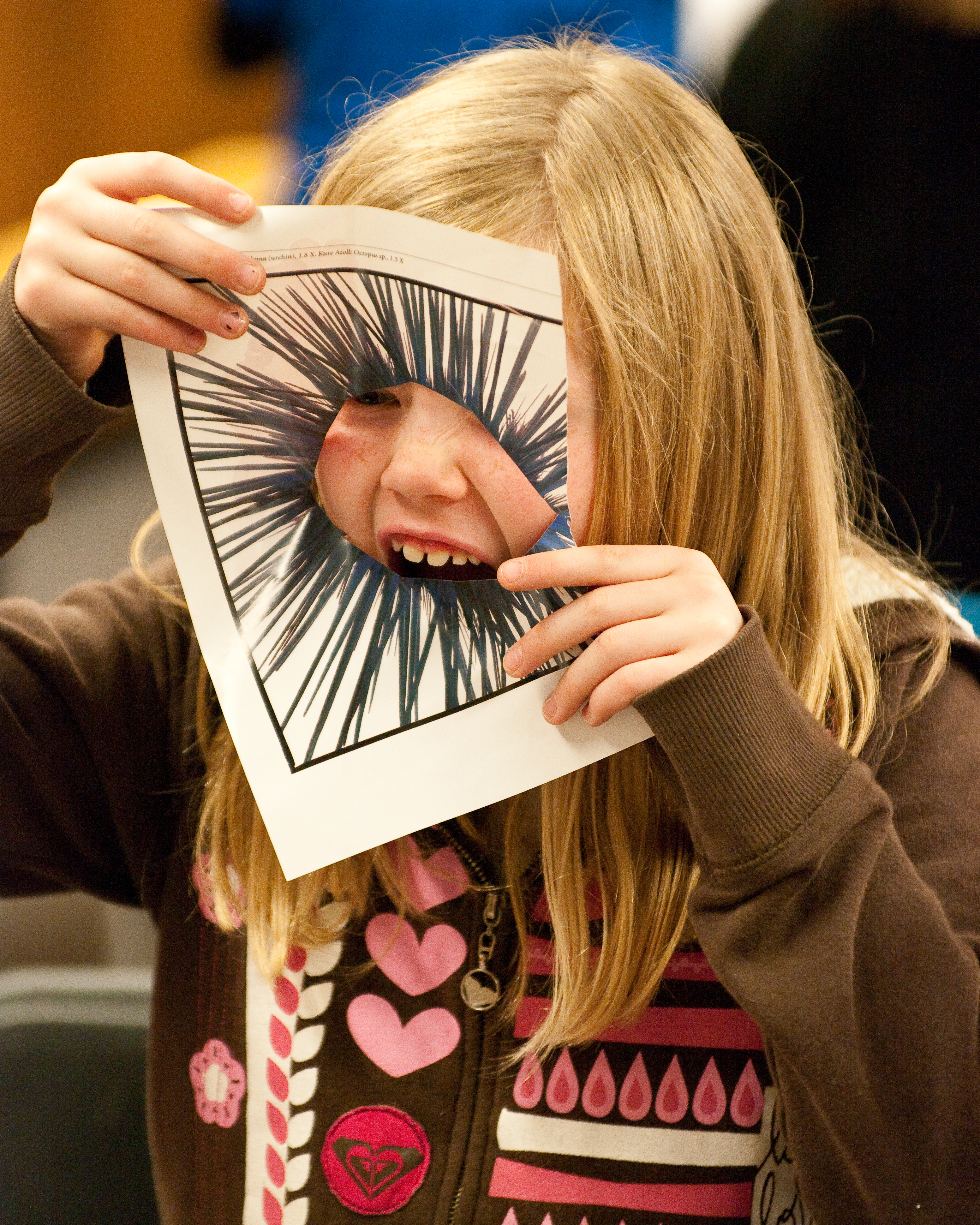 1:Haurren sormenaren erakusgarri bat.